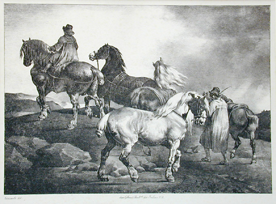 "Chevaux conduits à la foire" ("Horses Being Led to the Fair") by French painter Léon Cogniet. Lithograph.